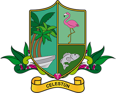 Escudo de Celestún, Yucatán